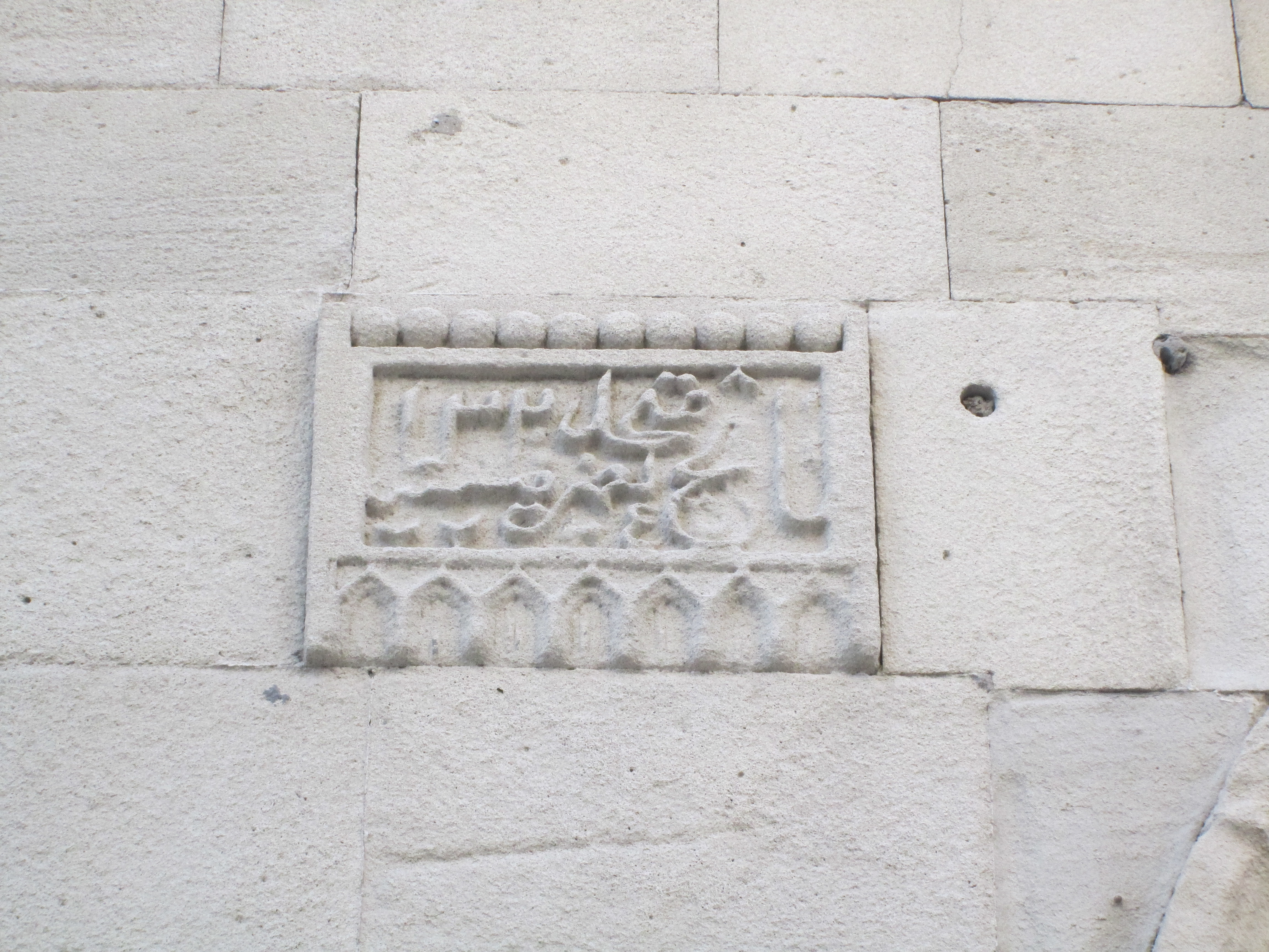 Hacı Bani məscidinin daş kitabəsi